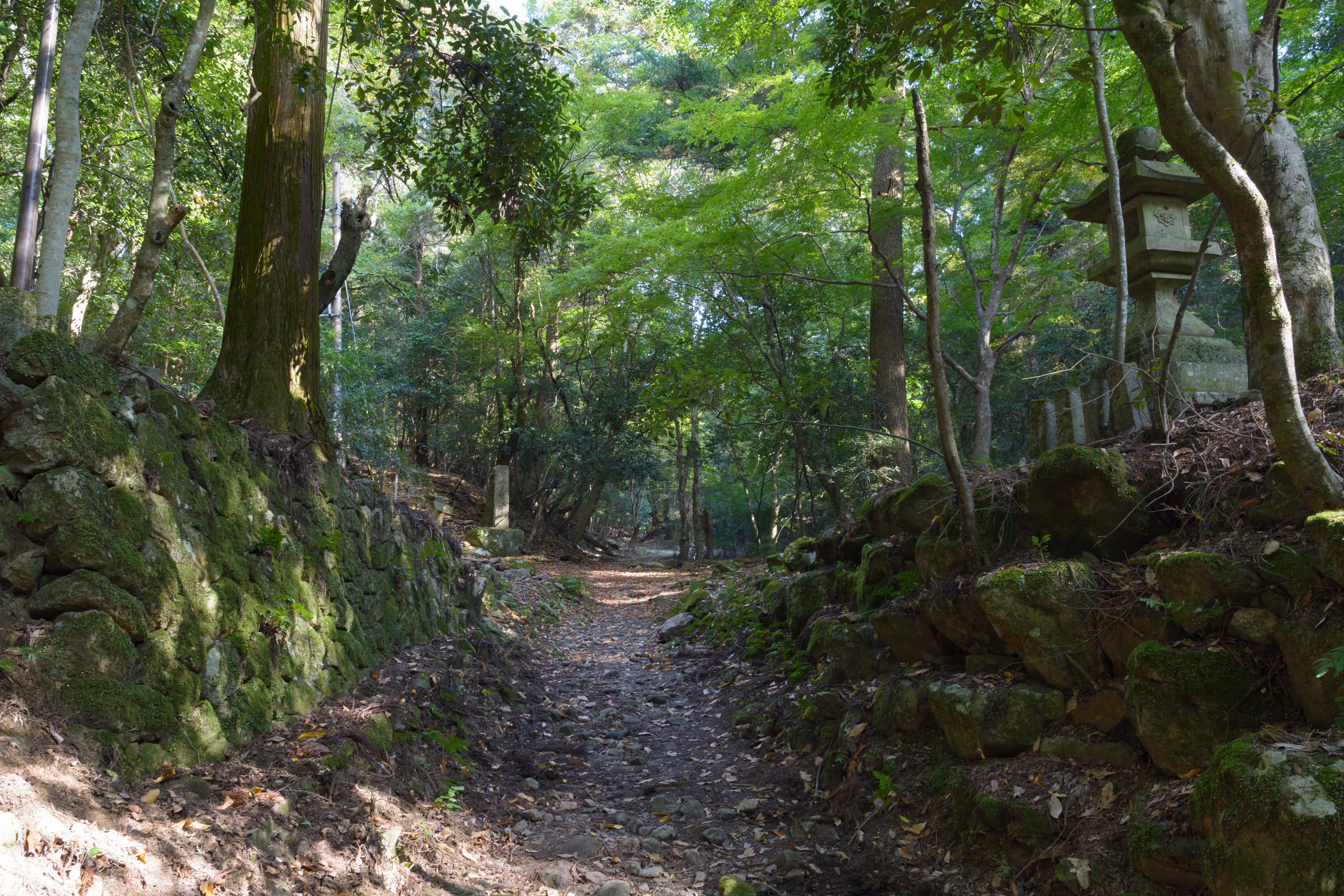 柳生街道滝坂の道（奈良市春日野町）。石畳が始まるあたりの街道両脇に、旅の安全を祈願した春日大社の灯篭が建つ。向かって左、道の北側に建てられた灯篭は欠損している。